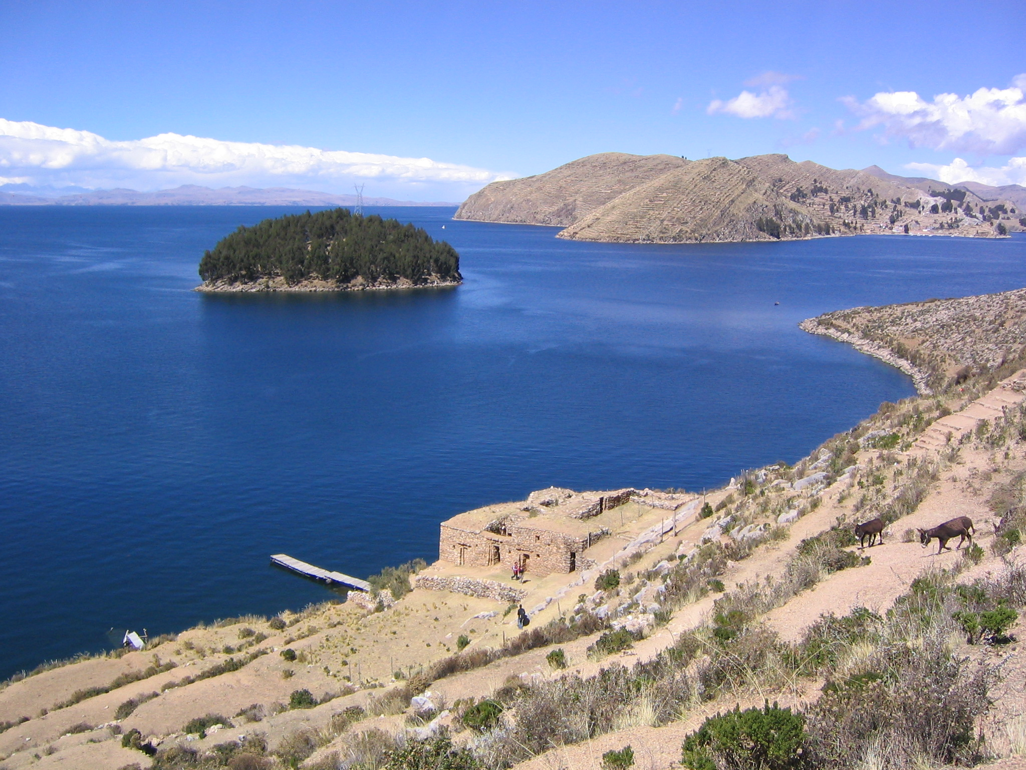 Isla Chelleca Estrecho de Yampupata y Lago Titicaca La Paz Bolivia